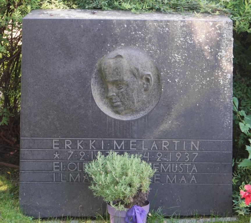 Grab des finnischen Komponisten und Dirigenten Erkki Melartin (1875–1937) auf dem Friedhof Hietaniemi in Helsinki